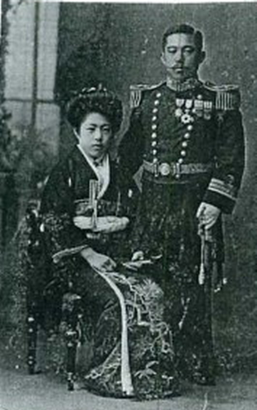 １９１０年１月２２日『琉球新報』「漢那憲和少佐及び夫人」